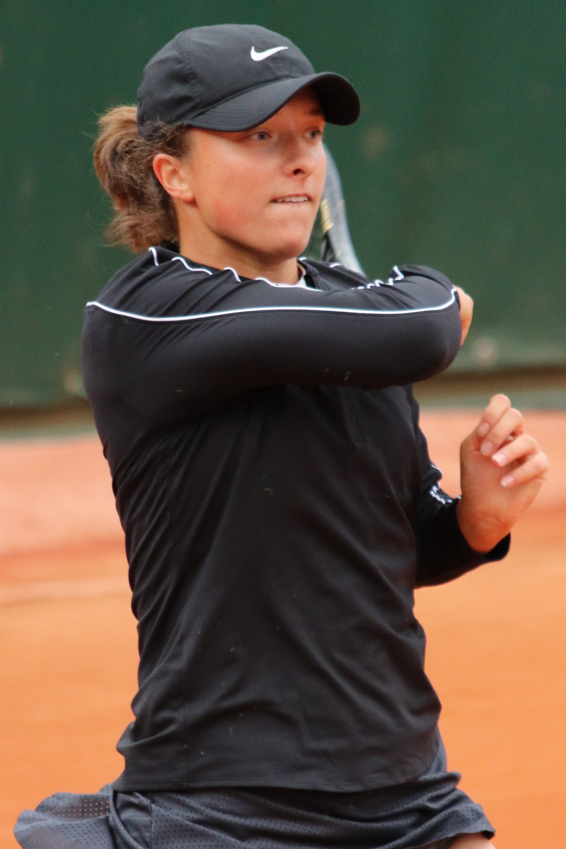 Swiatek RG19 (1)